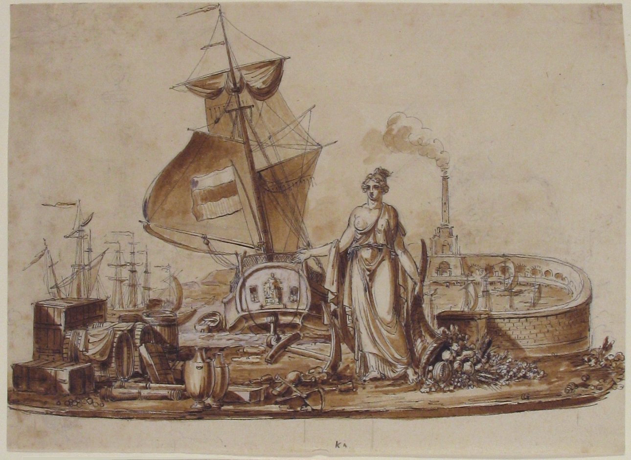 Drawing; Drawings